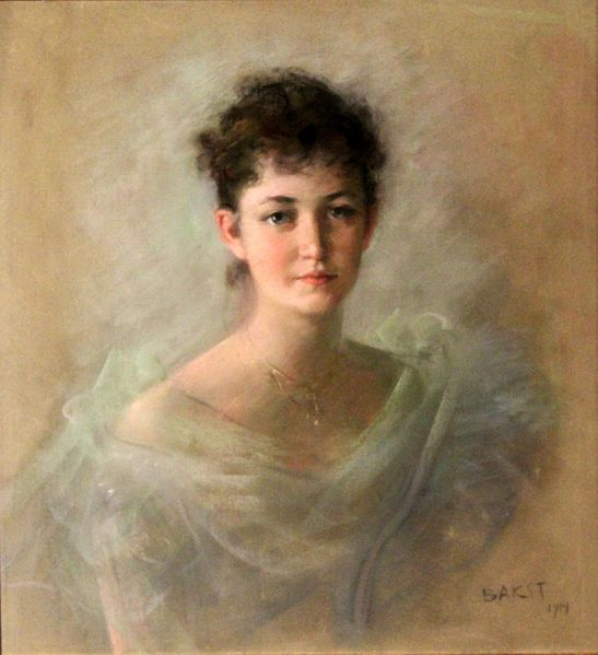 Růžena Zátková na portrétu od Léona Baksty